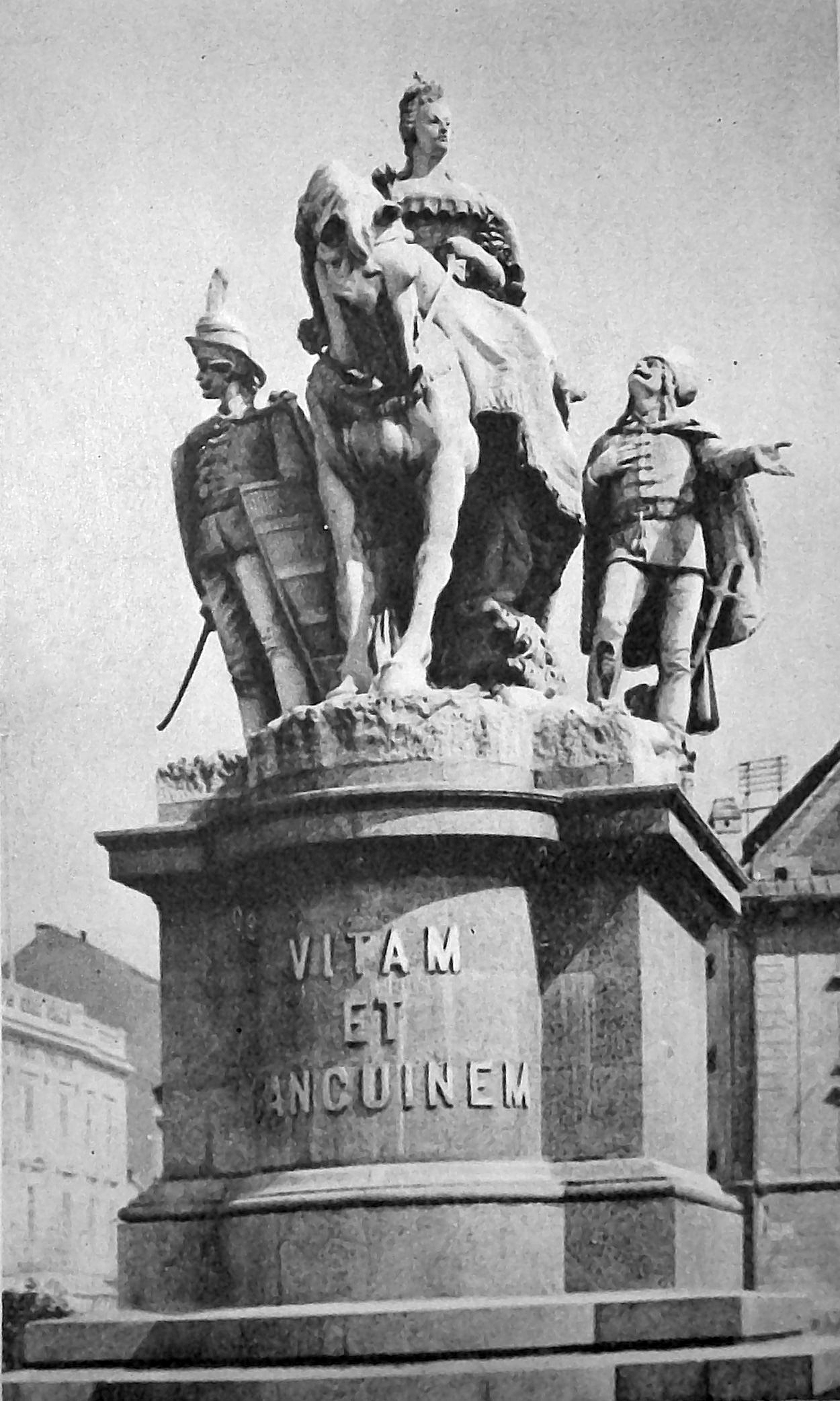 Súsošie Márie Terézie v Bratislave, zničené v roku 1921.